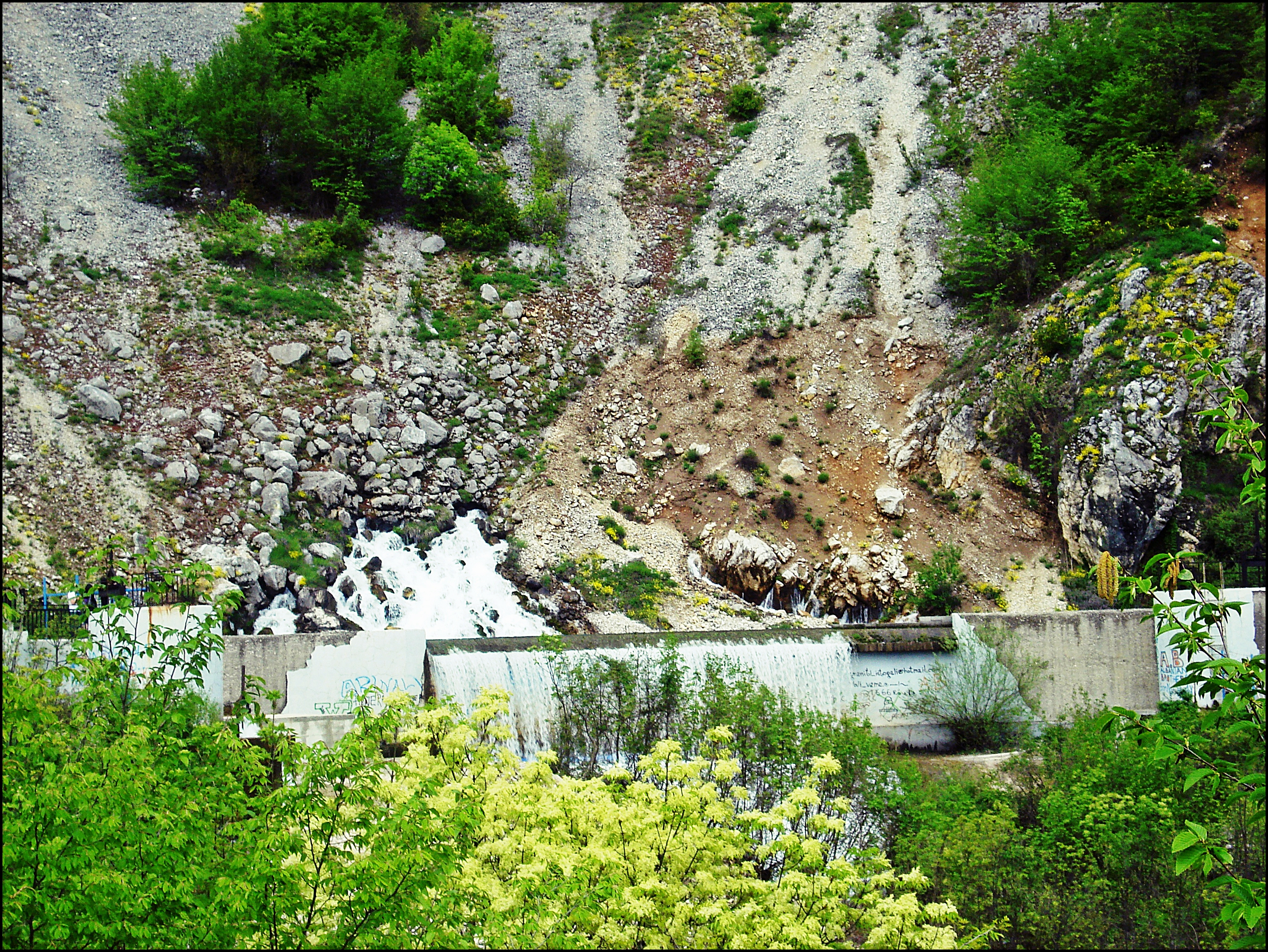 Pamje ku buron lumi i Istogut dhe ujëvara që krijohet mbi pendë